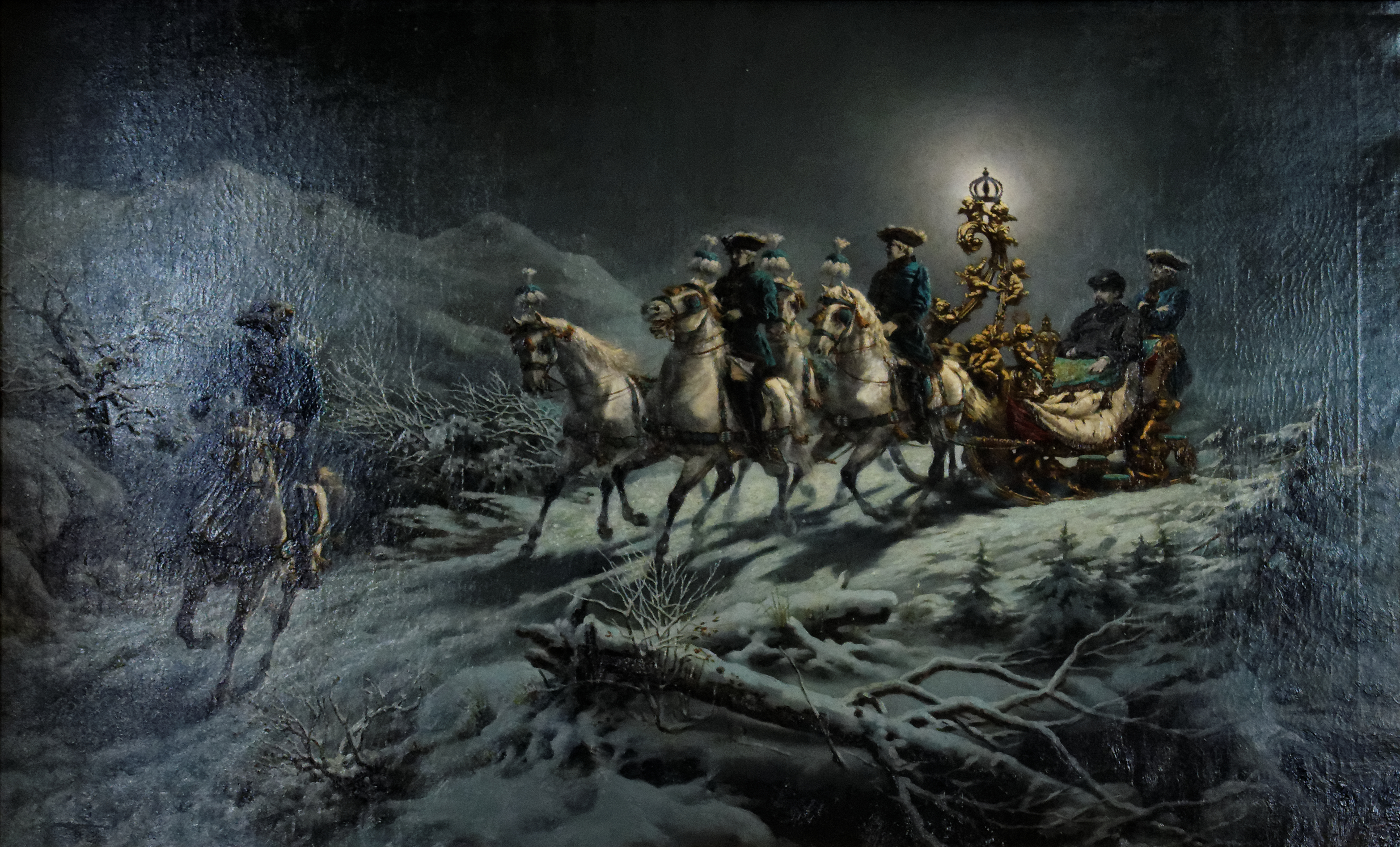 Promenade nocturne en traineau de Louis II de Bavière (1845-1886). Huile sur toile de Richard Wenig exposée au château de Nymphenburg, Munich.